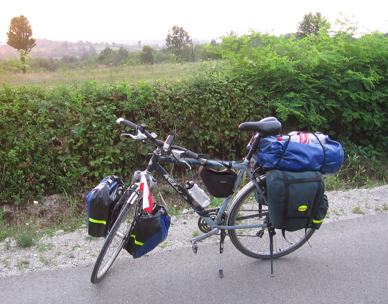 rower trekingowy wraz z pełnym ładunkiem bagażu podczas rowerowej wyprawy turystycznej